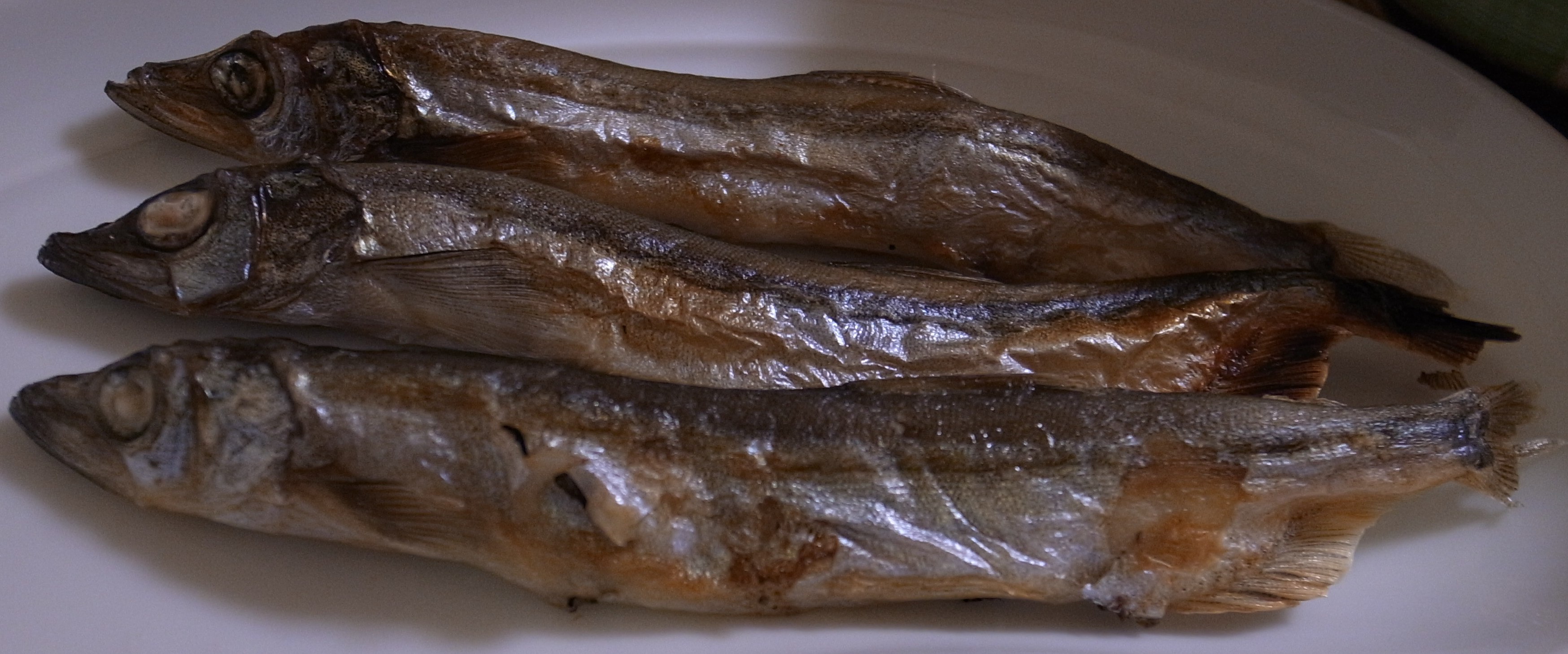 Grilled Capelins